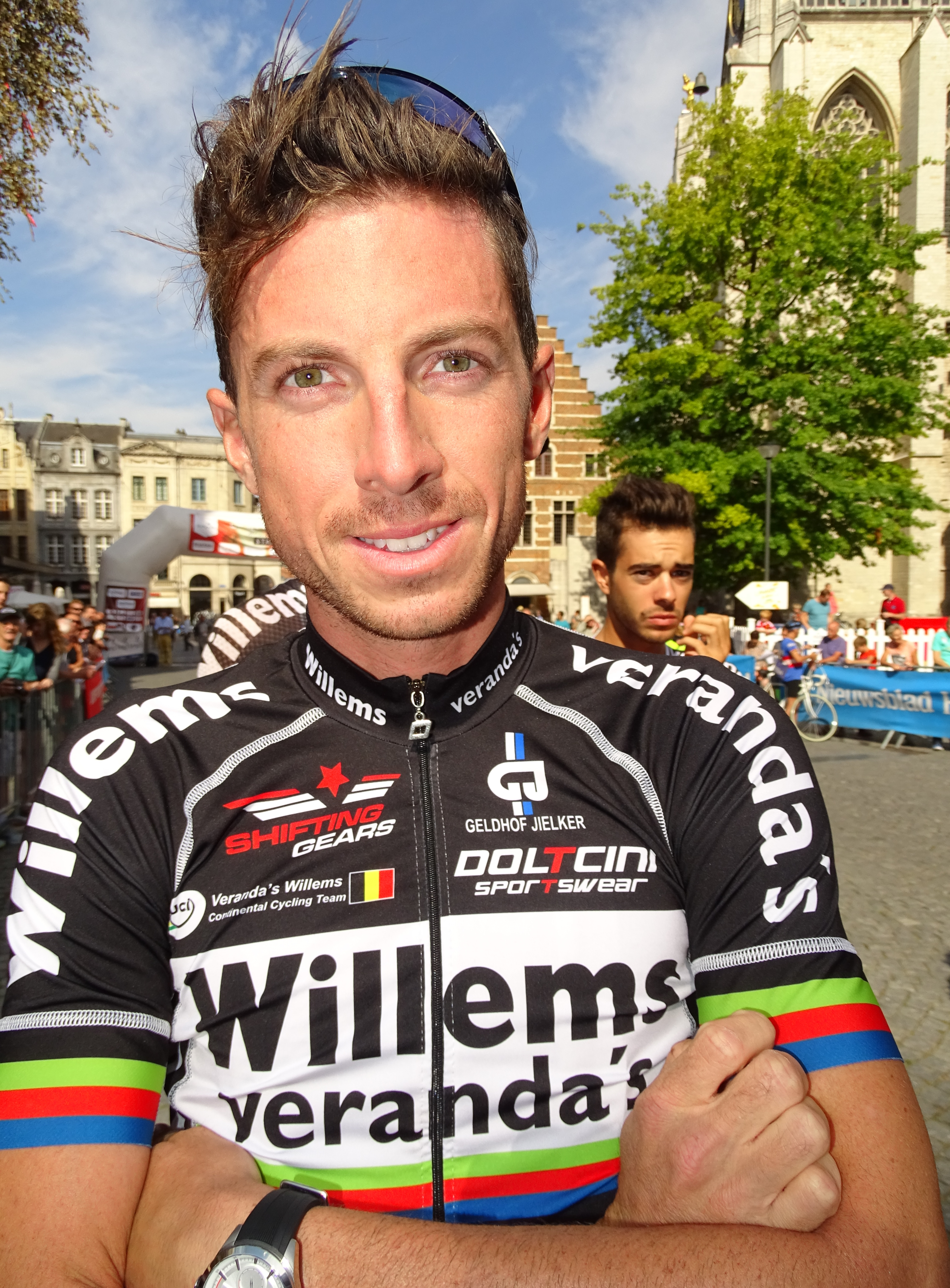 Reportage réalisé le dimanche 23 août à l'occasion du départ et de l'arrivée du Grand Prix Jef Scherens 2015 à Louvain, Belgique.